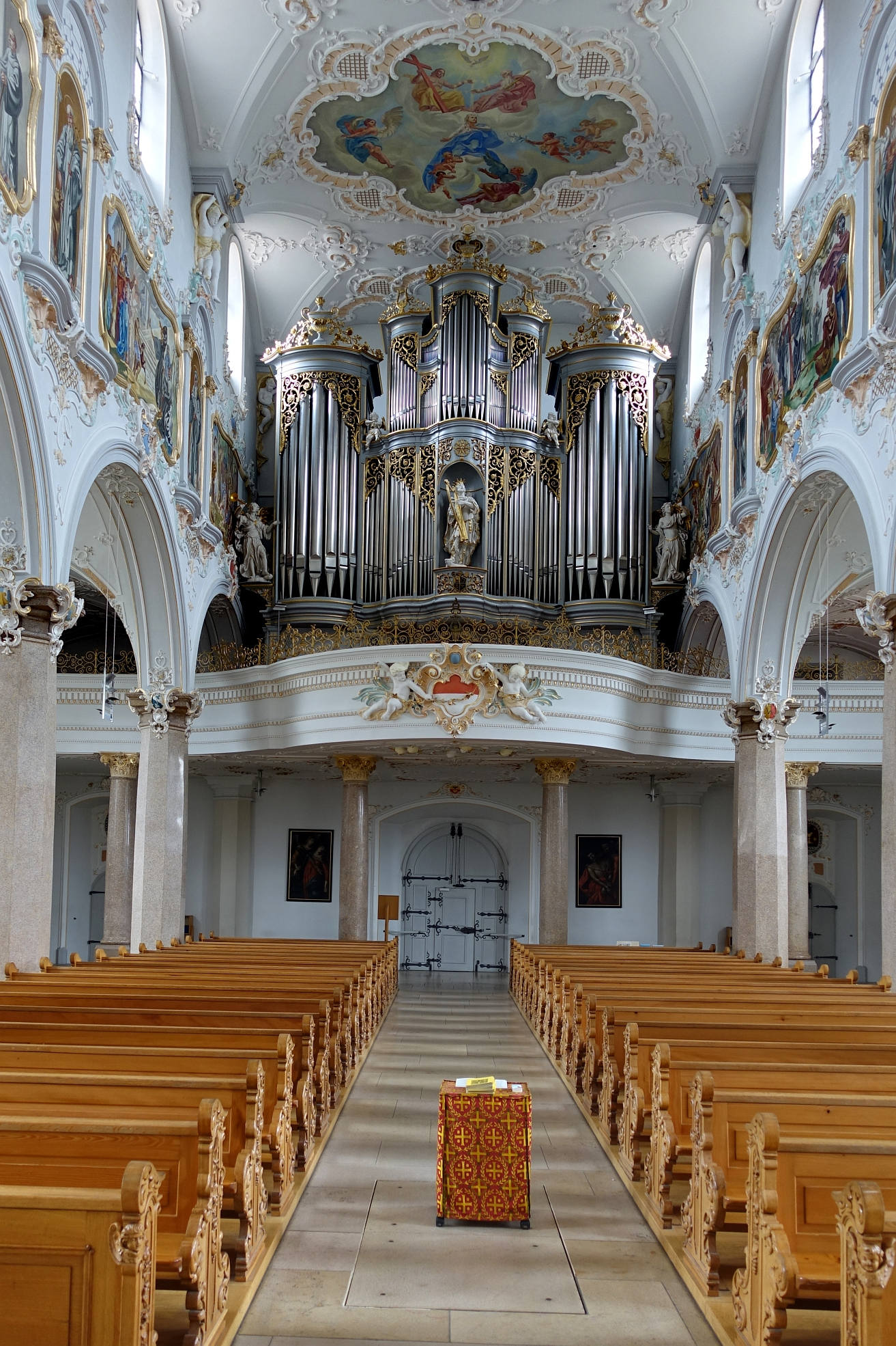 Orgel des Kloster Mariastein